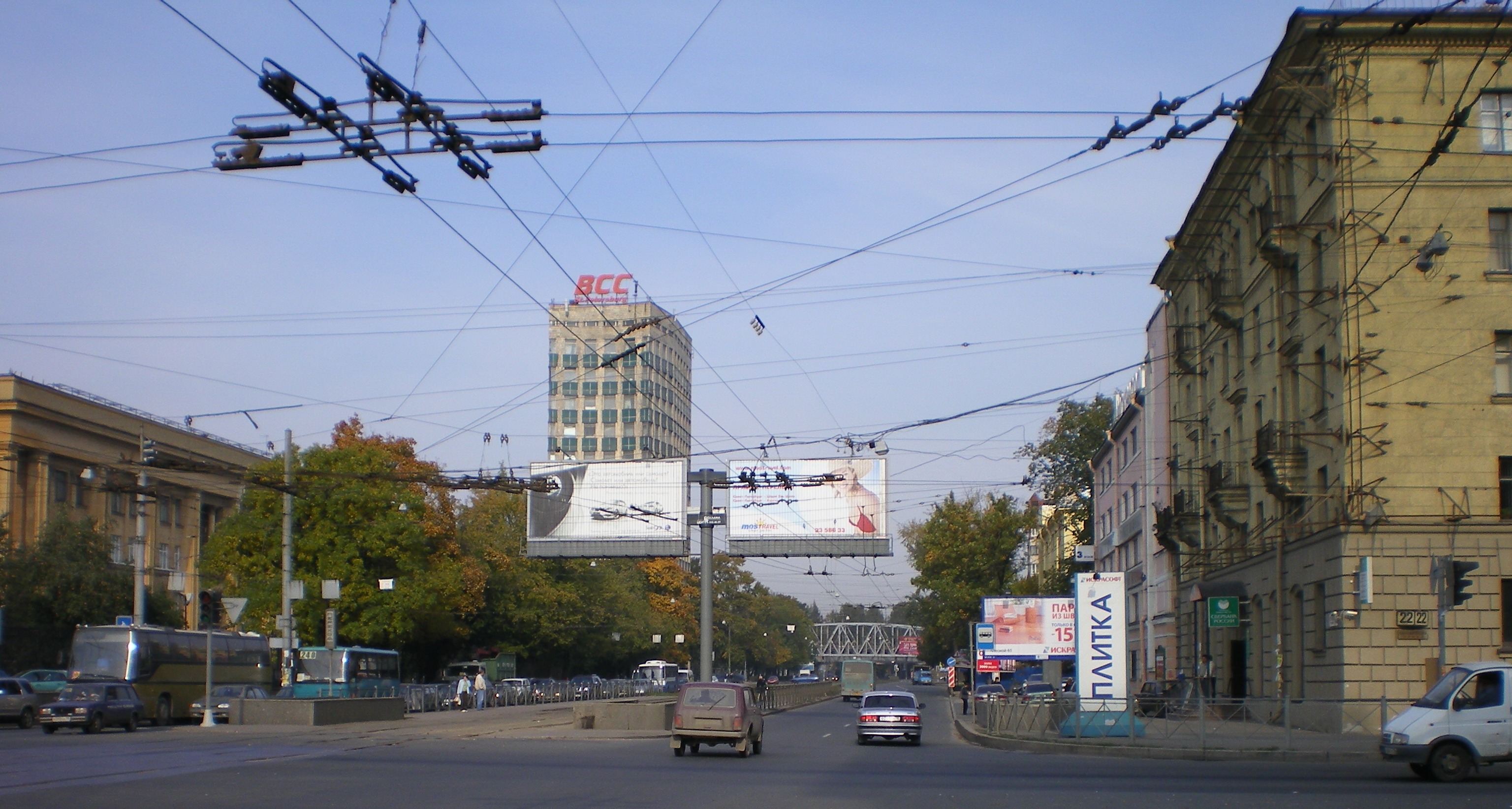 Вид на Лесной проспект от Кантемировской улицы.